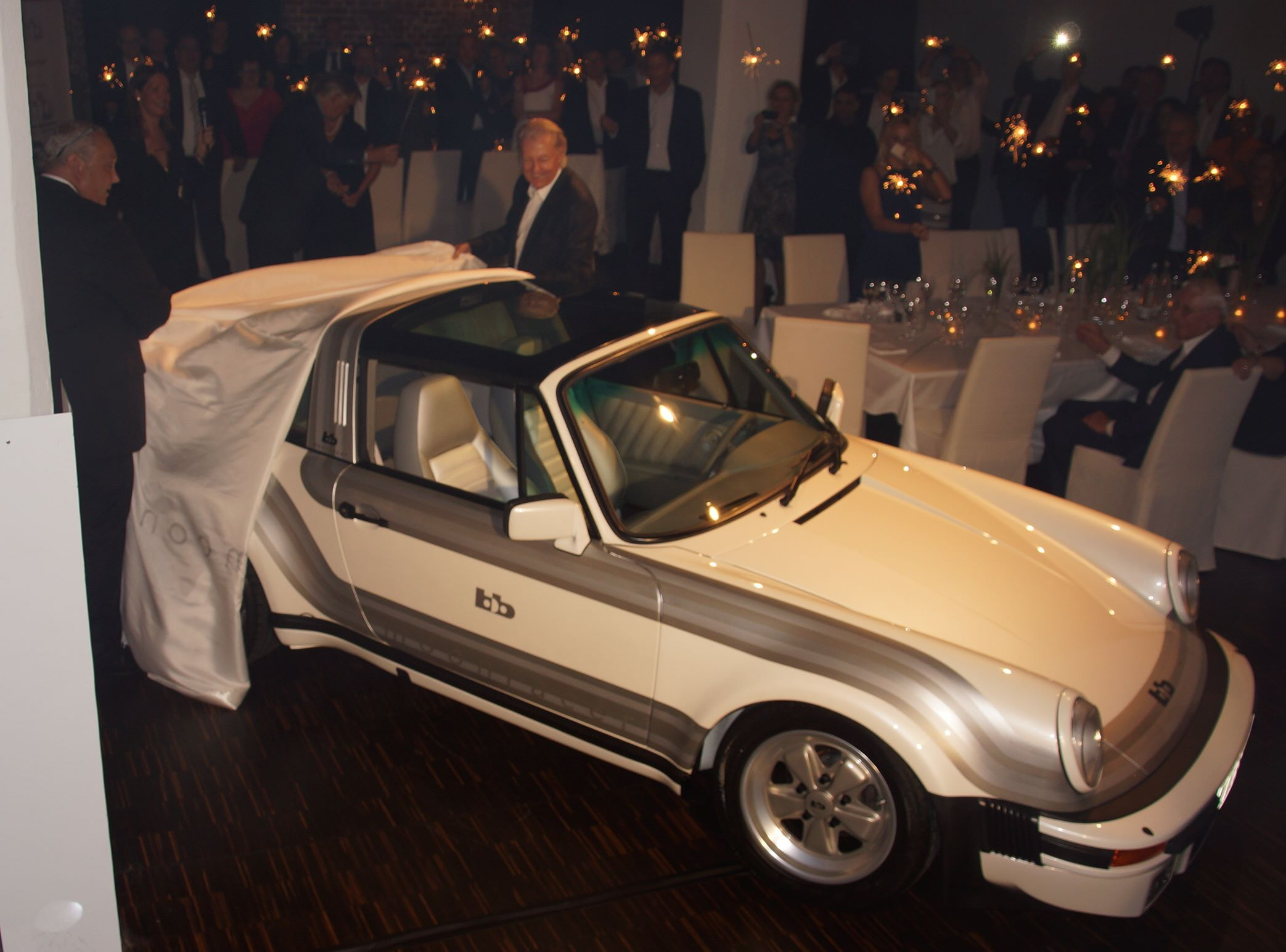 bb Moonracer Porsche bei der Enthüllung des bb Moonracer in der Klassikstadt Frankfurt am 20.-21. September 2014